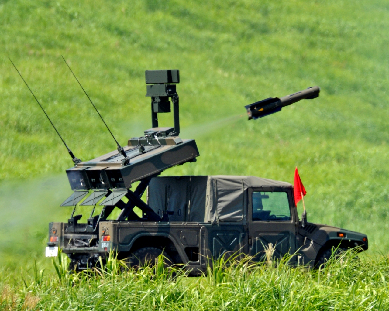 中距離多目的誘導弾の発射の様子。平成24年度富士総合火力演習の前日予行にて。 Nikon D4